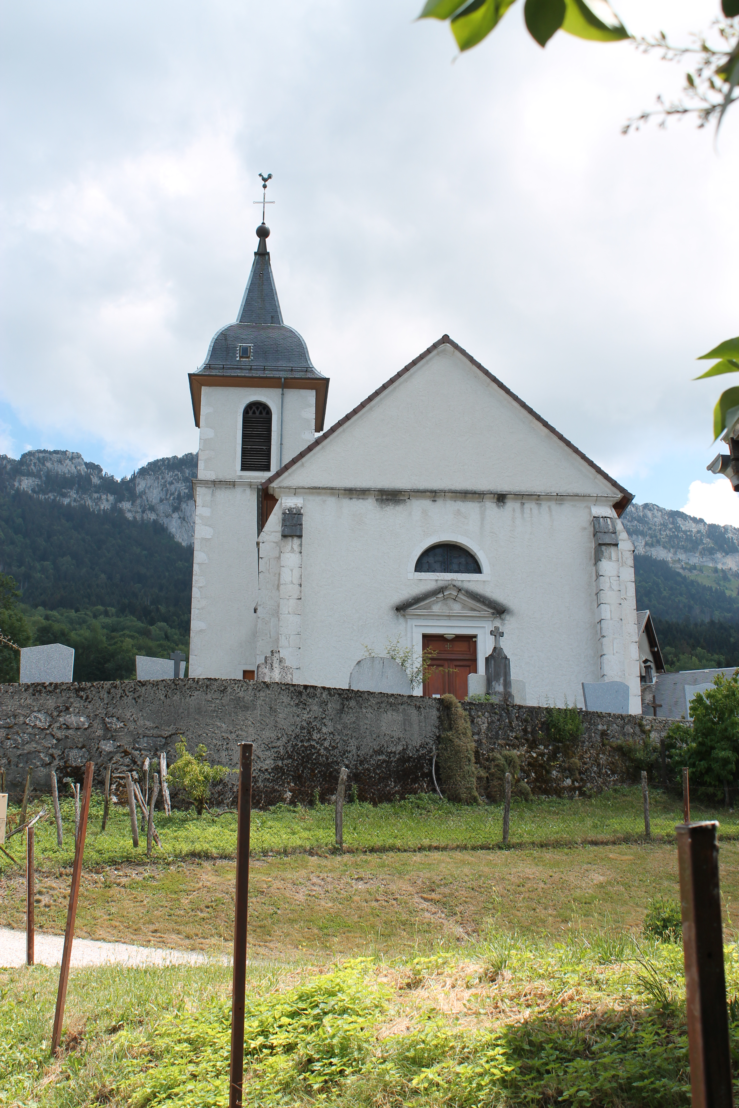 Façade de l'église Saint-Maurice de La Chapelle-Saint-Maurice (1840-1842).